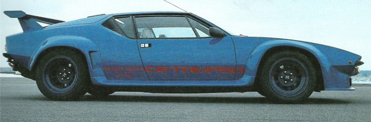 De Tomaso Pantera GT5 in Turin. Datum: 10.09.1998. Sonstiges: JPEG-Bild, Abmessungen; 760×250, 52 kb. Lizenz: Ich stimme der Public-Domain Lizenz zu und veröffentliche das Bild.